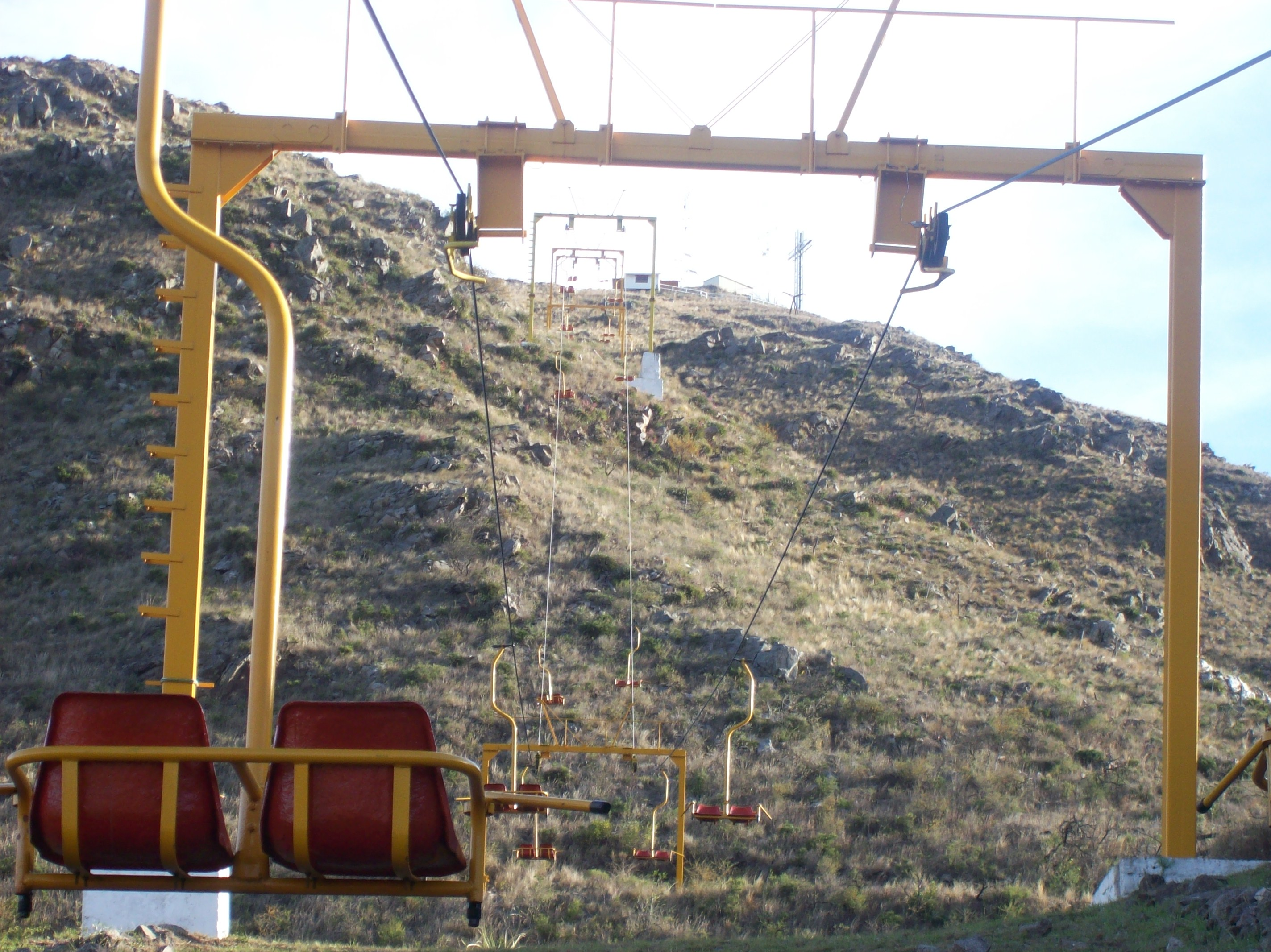 Aerosilla del Cerro Pan de Azúcar en Cosquín, departamento Punilla, provincia de Córdoba, Argentina.